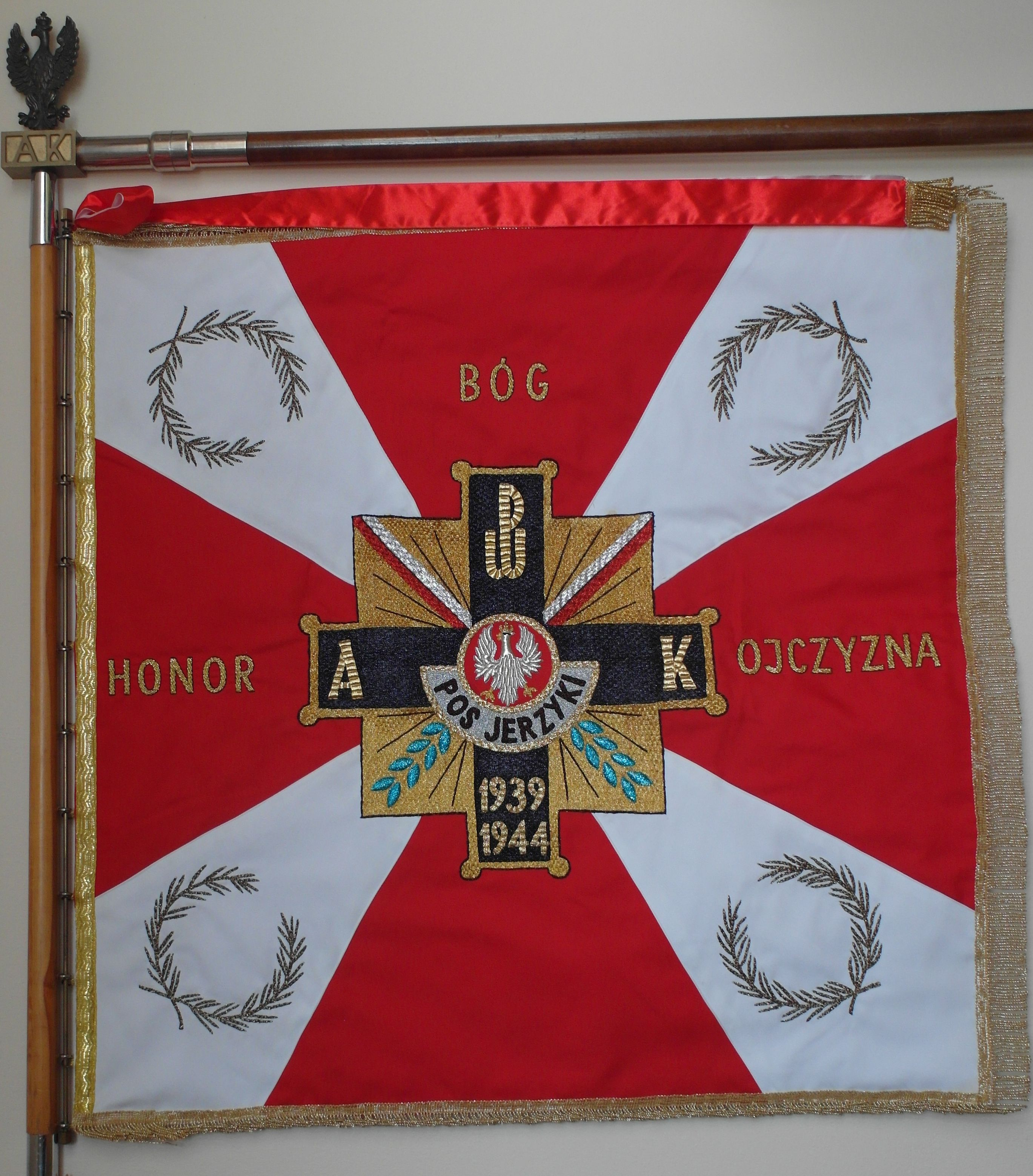 Historyczny sztandar ufundowany przez POS,,Jerzyki"AK, dla HKSz z Wołomina-awers